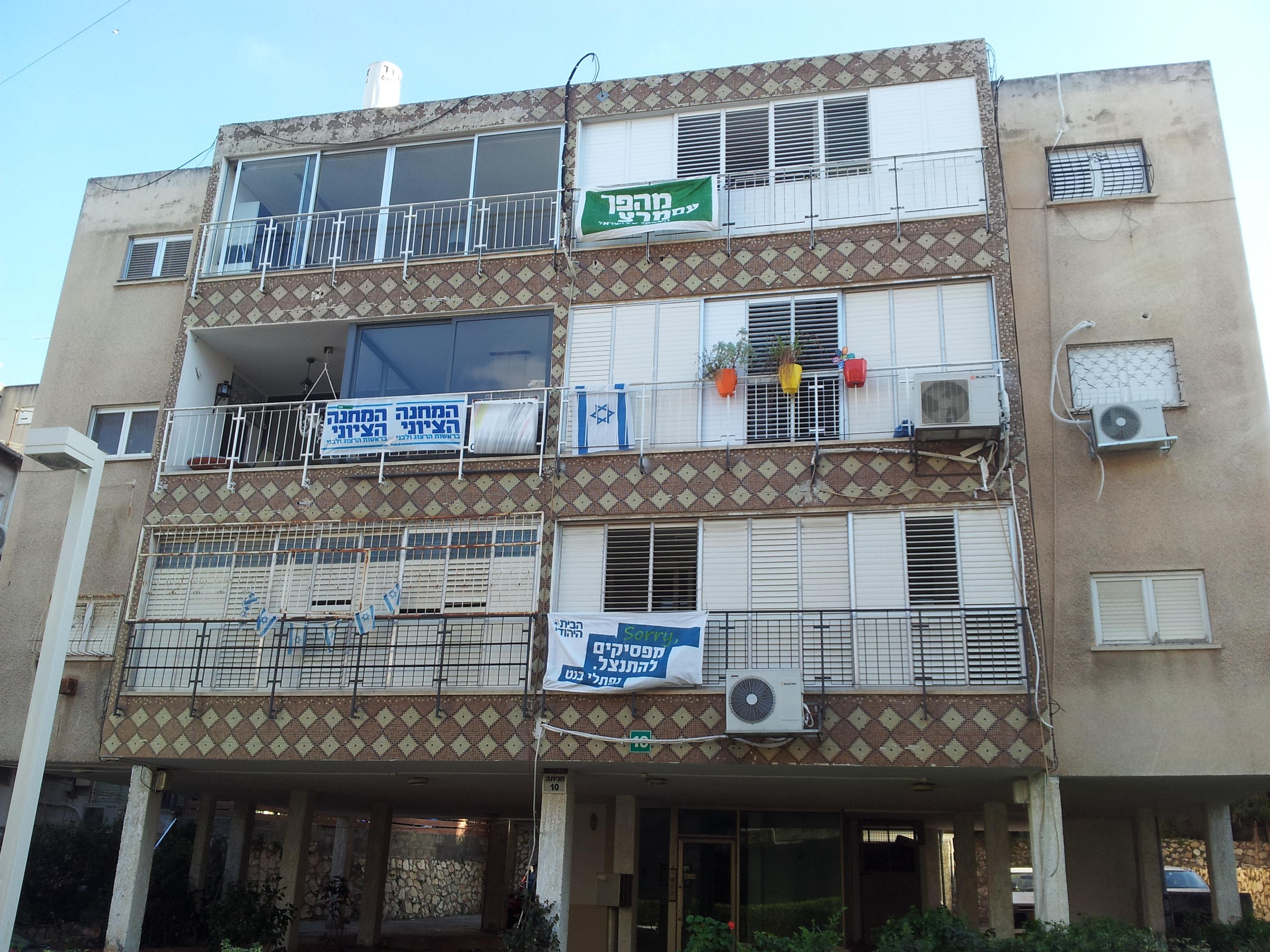 שלטי בחירות על בניין בגבעתיים